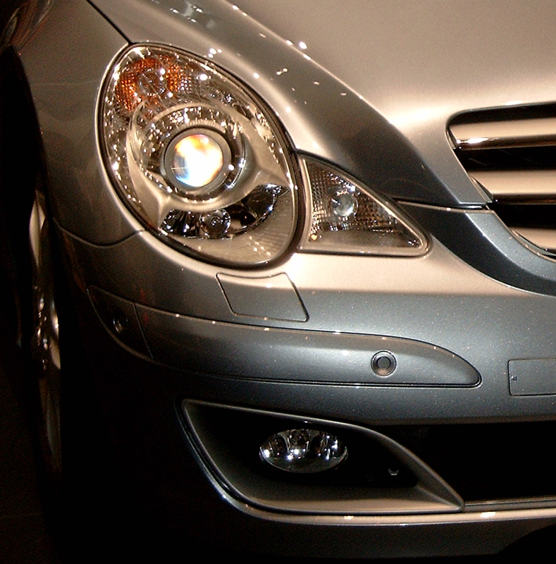 Lichter der R-Klasse von Mercedes-Benz